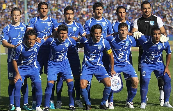 استقلال پرسپولیس شهرآورد ورزشگاه آزادی تهران